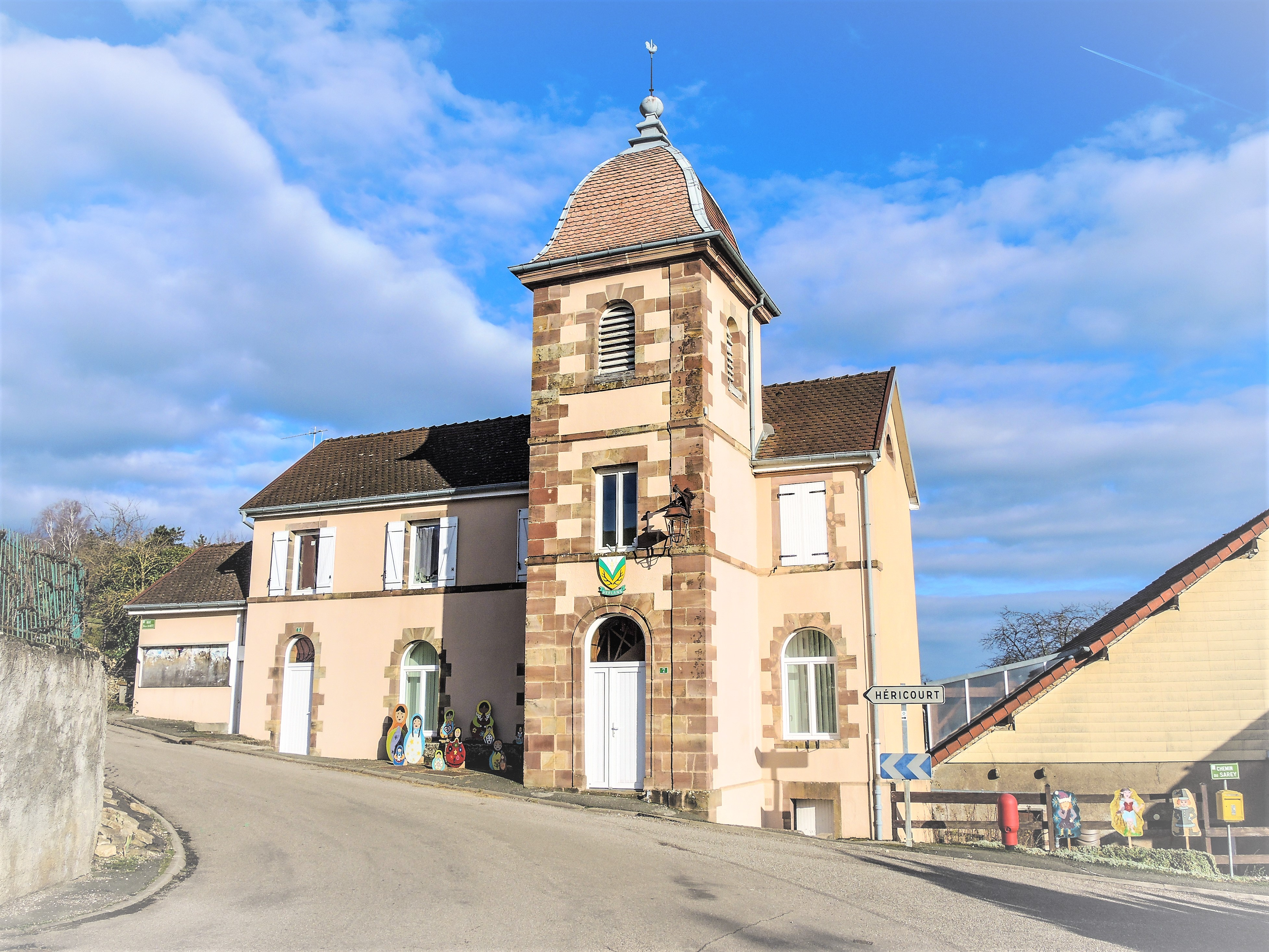 Mairie du village de verlans. Haute-Saône.